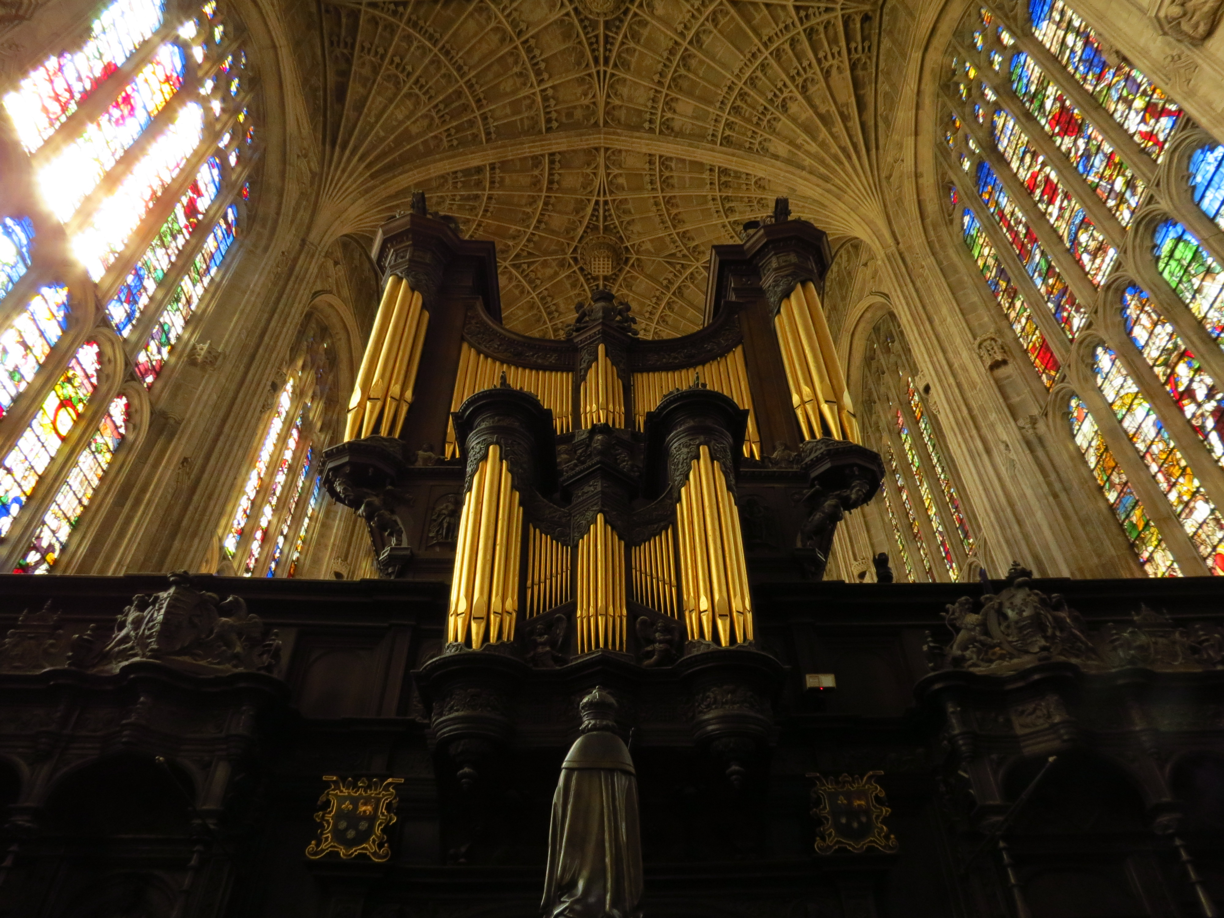 Vue de Cambridge.